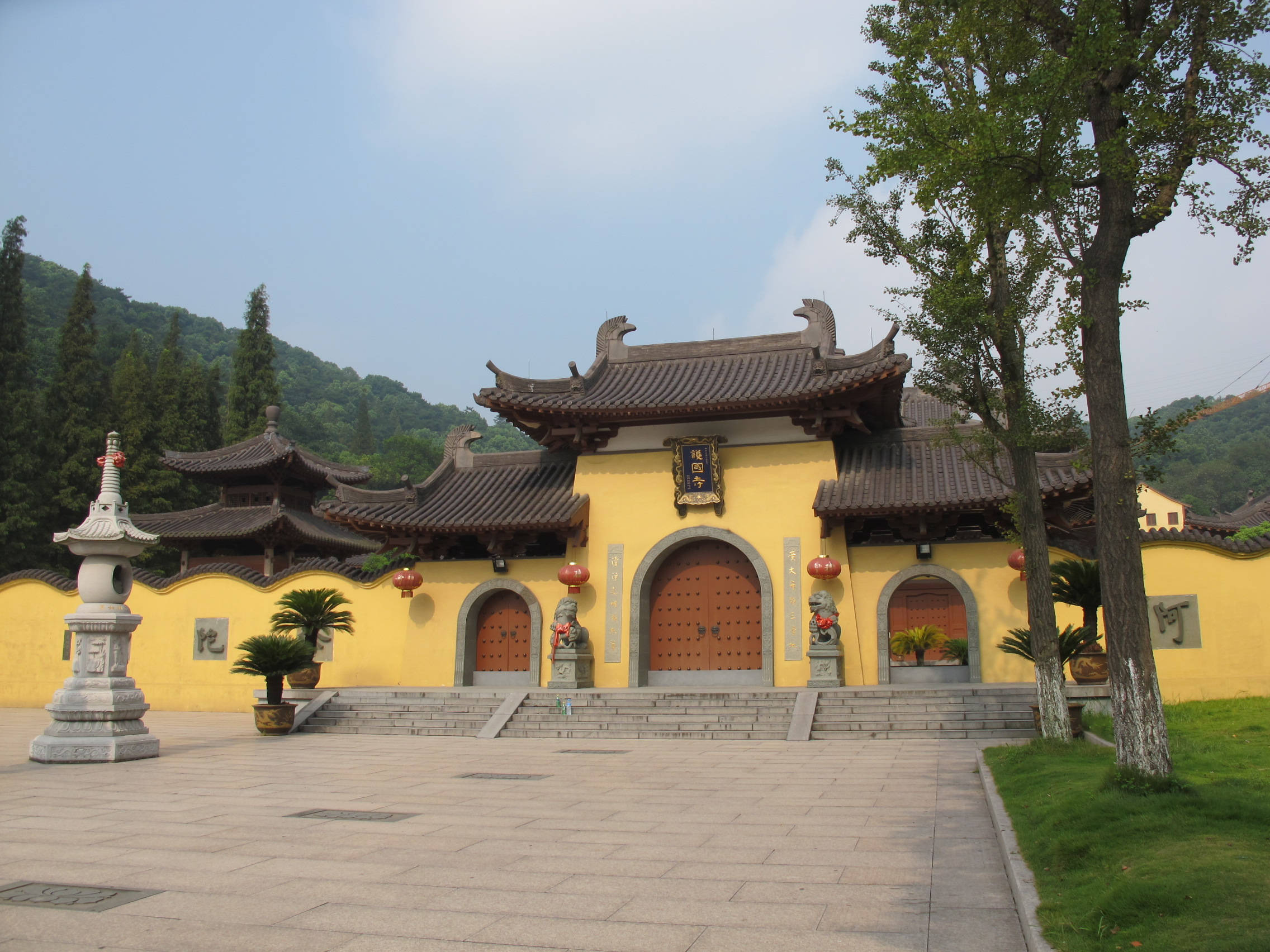 护国寺大门口的通道